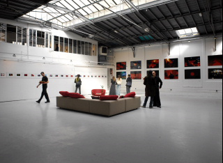 Exposition "Voyage au pays des Sens" à la galerie Nikki Diana Marquardt à Paris, France, en 2005